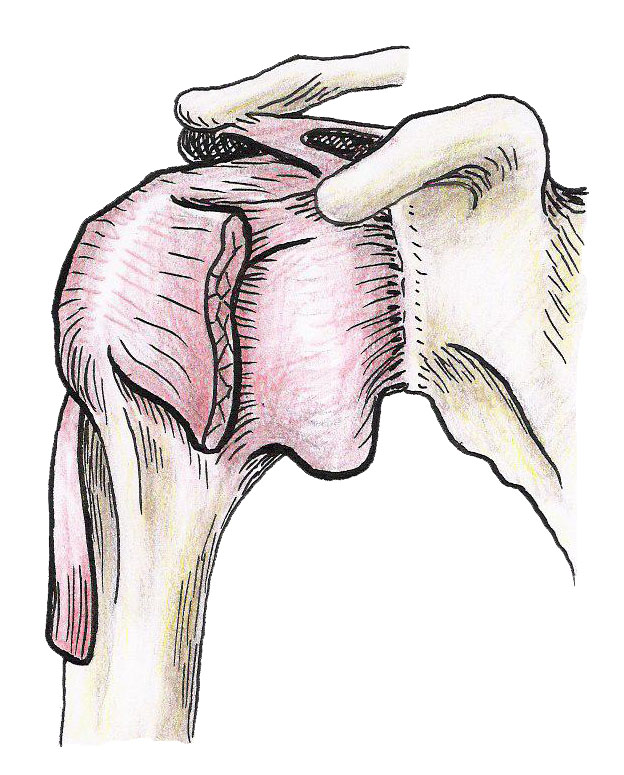 Yoga anatomie